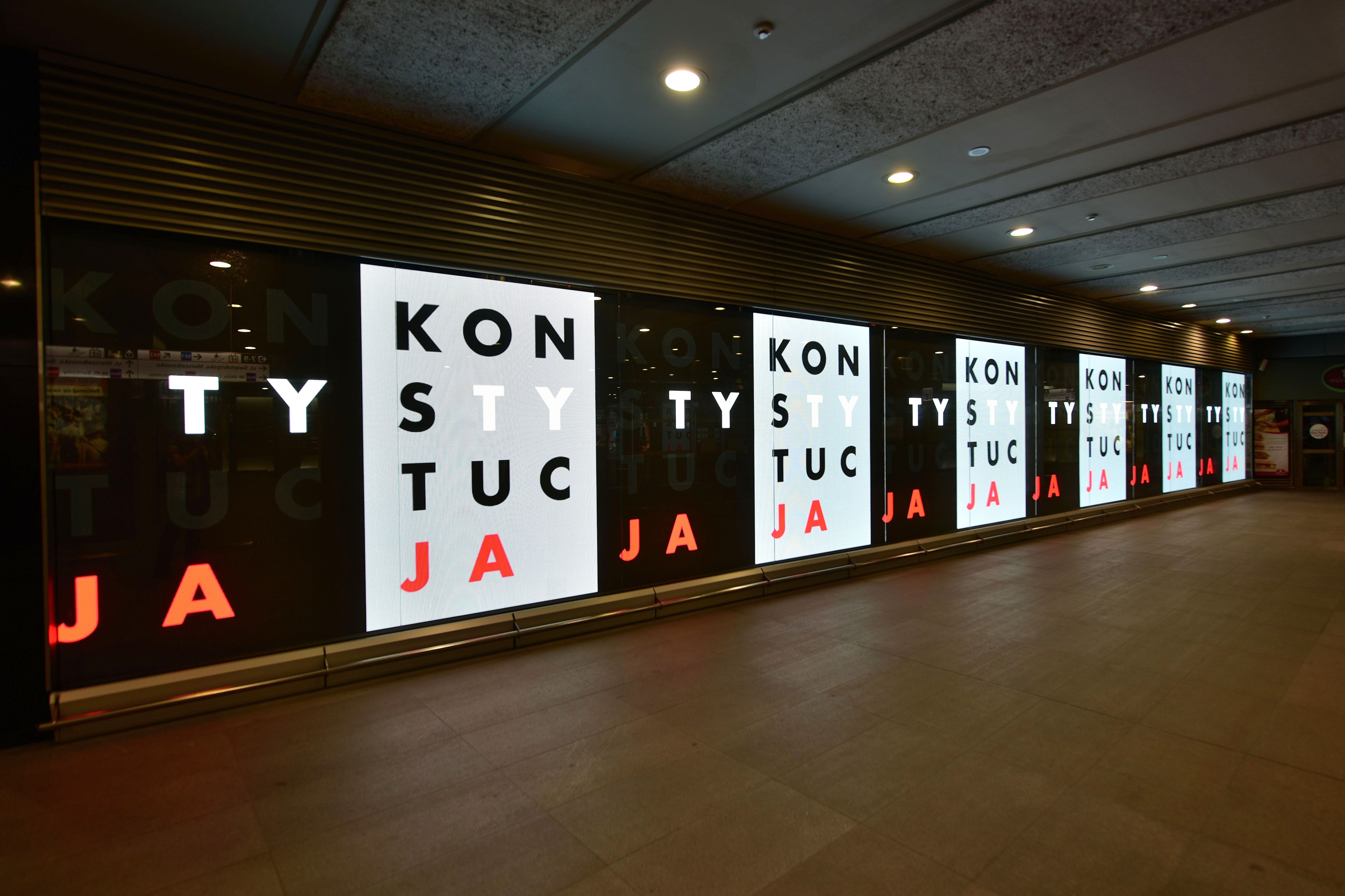 Napis "Konstytucja" wyświetlany na ekranie wizyjnym na stacji metra Świętokrzyska w Warszawie związku ze zmianami w sądownictwie (kryzys wokół Sądu Najwyższego)